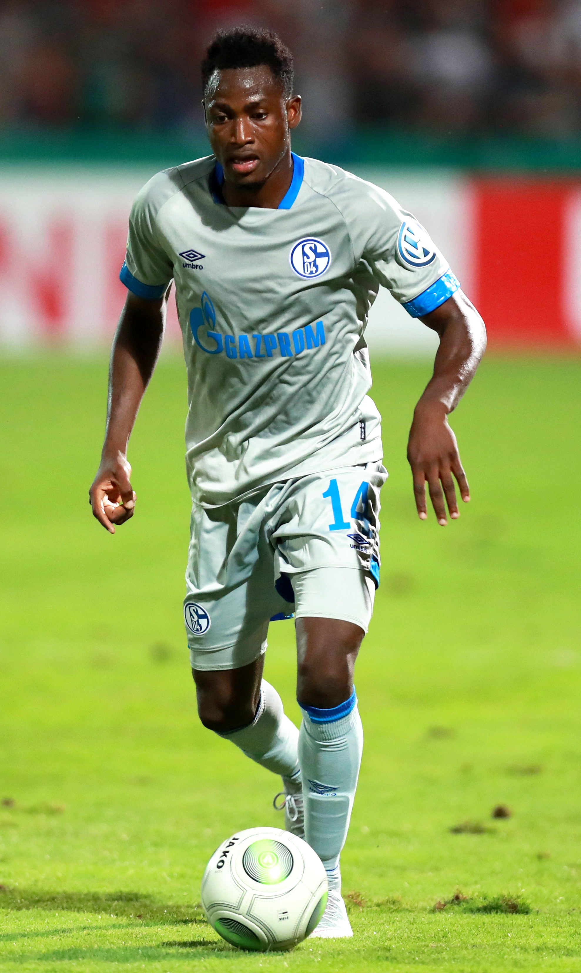 DFB-Pokal 2018/19, 1. Hauptrunde: 1. FC Schweinfurt 05 gegen FC Schalke 04 0:2 (0:1)